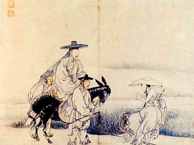 반상도(班常圖) 종이에 수묵담채 27.5 x 33.5cm . 평양박물관